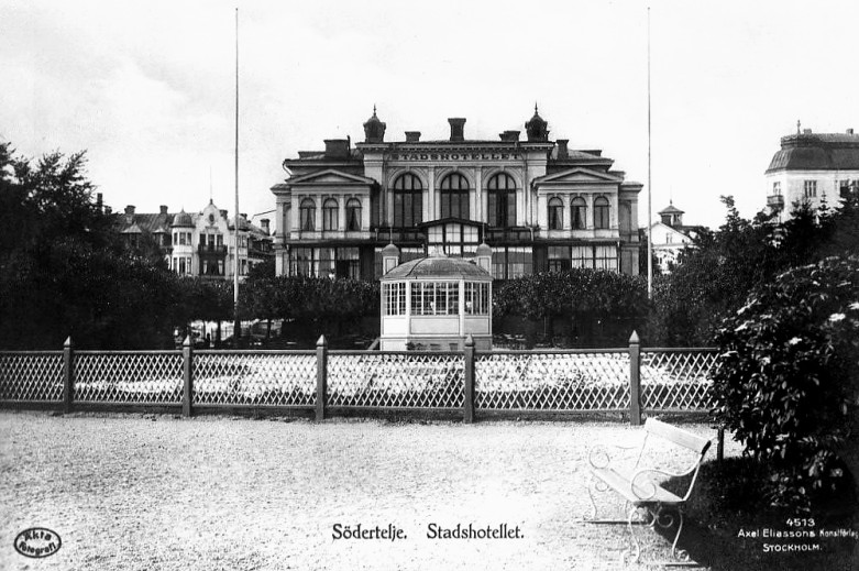 Före detta Södertälje stadshotell, i bakgrunden t.v. syns Badhotellet